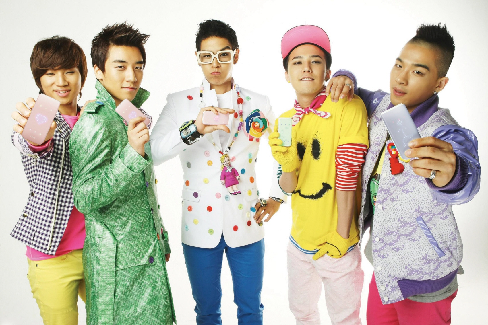 LG 롤리팝2 출시